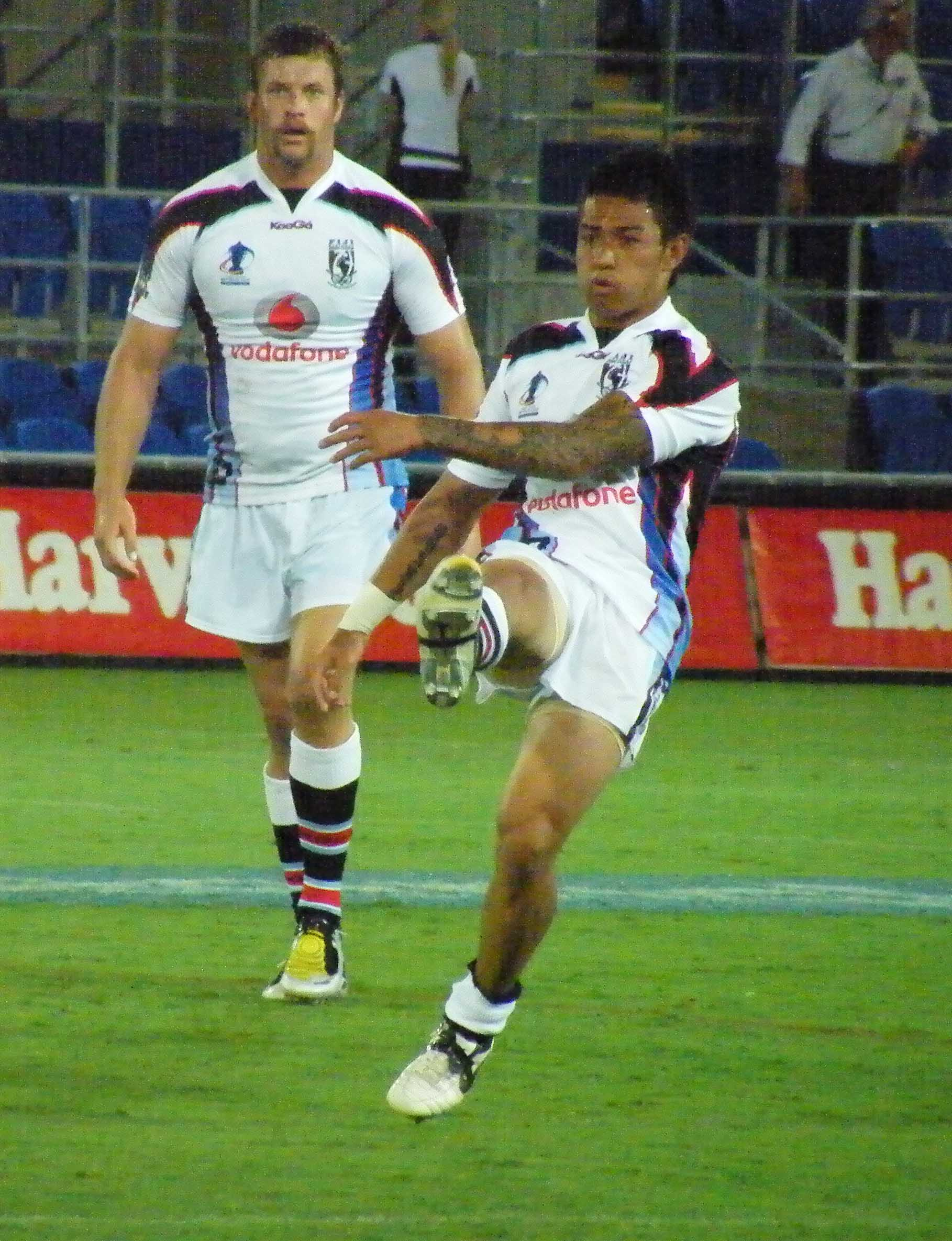 RLWC - Fiji v Ireland, Gold Coast 2008. Fijian half/hooker Aaron Groom.